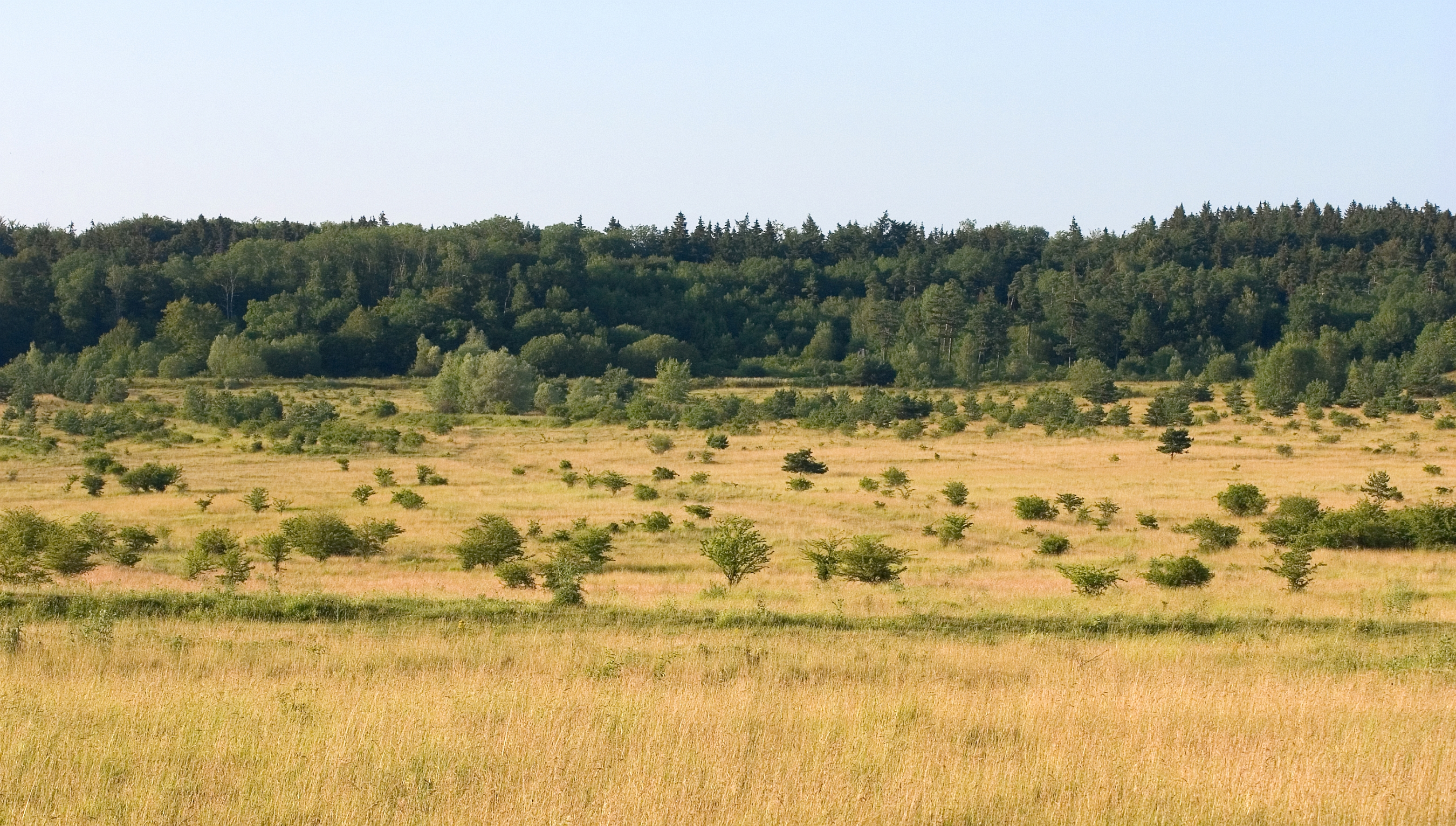 Landschaft im FFH-Gebiet „Krahnberg-Kriegberg“ bei Gotha